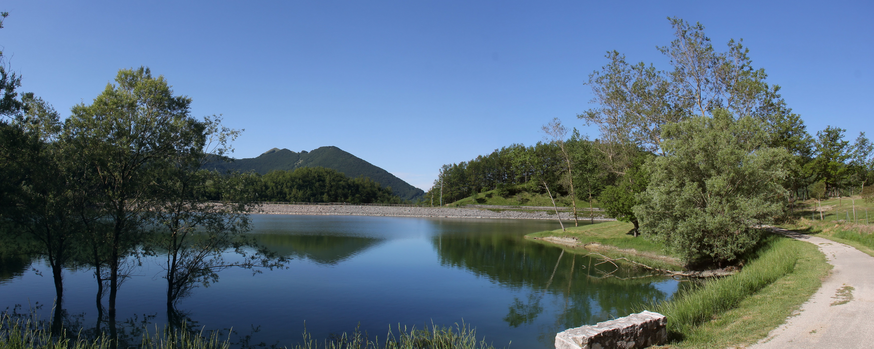 Lago Selva, Fontana Cicchetta, Frosinone, Lazio, Italy - Path over the dam